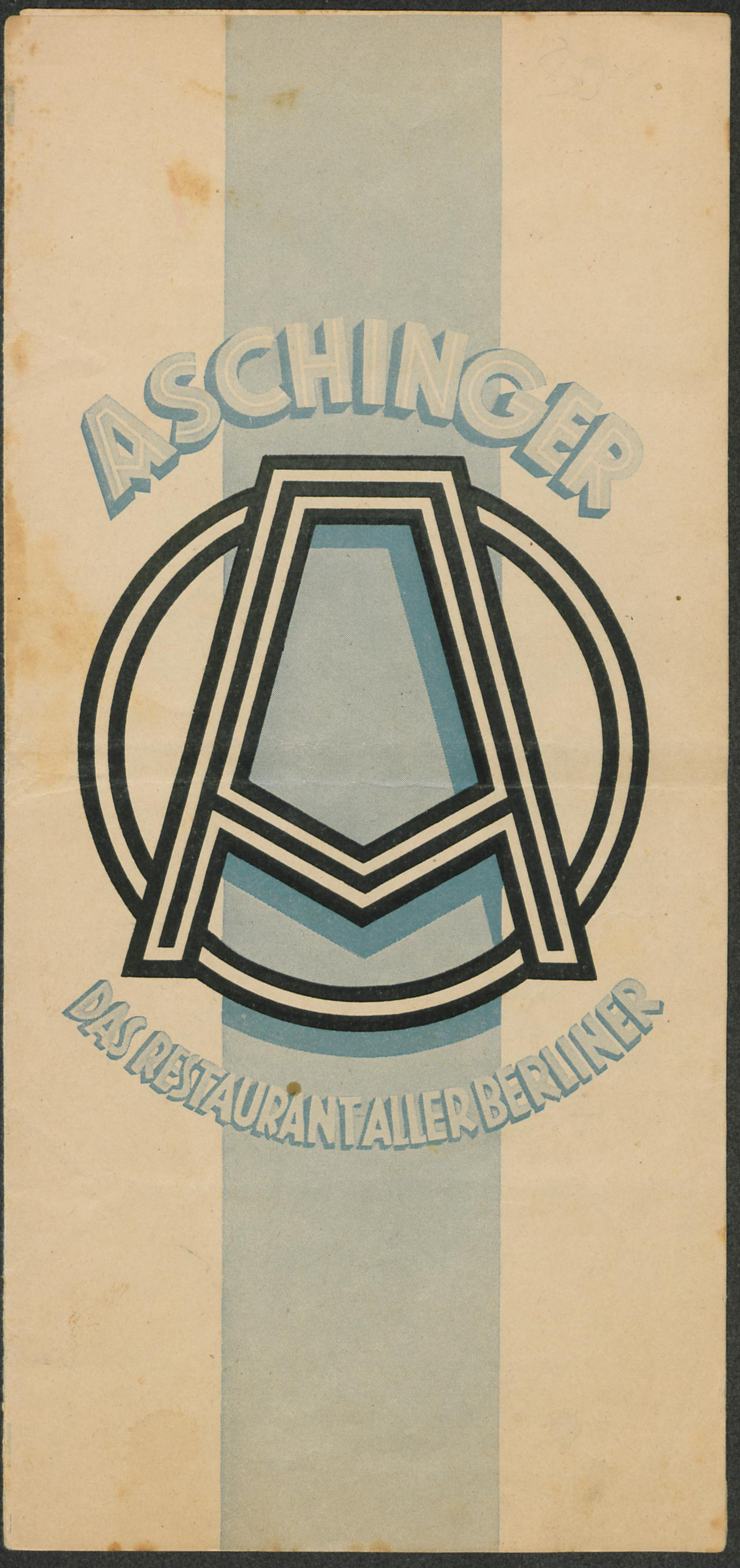 Speisekarte Aschinger, 30. (Bier-) Quelle, Friedrichstraße 97, 12. Mai 1936 Alle Inhalte von dilibri stehen unter der Creative Commons License, Attribution-NonCommercial-ShareAlike 3.0. Namensnennung: dilibri Rheinland-Pfalz (